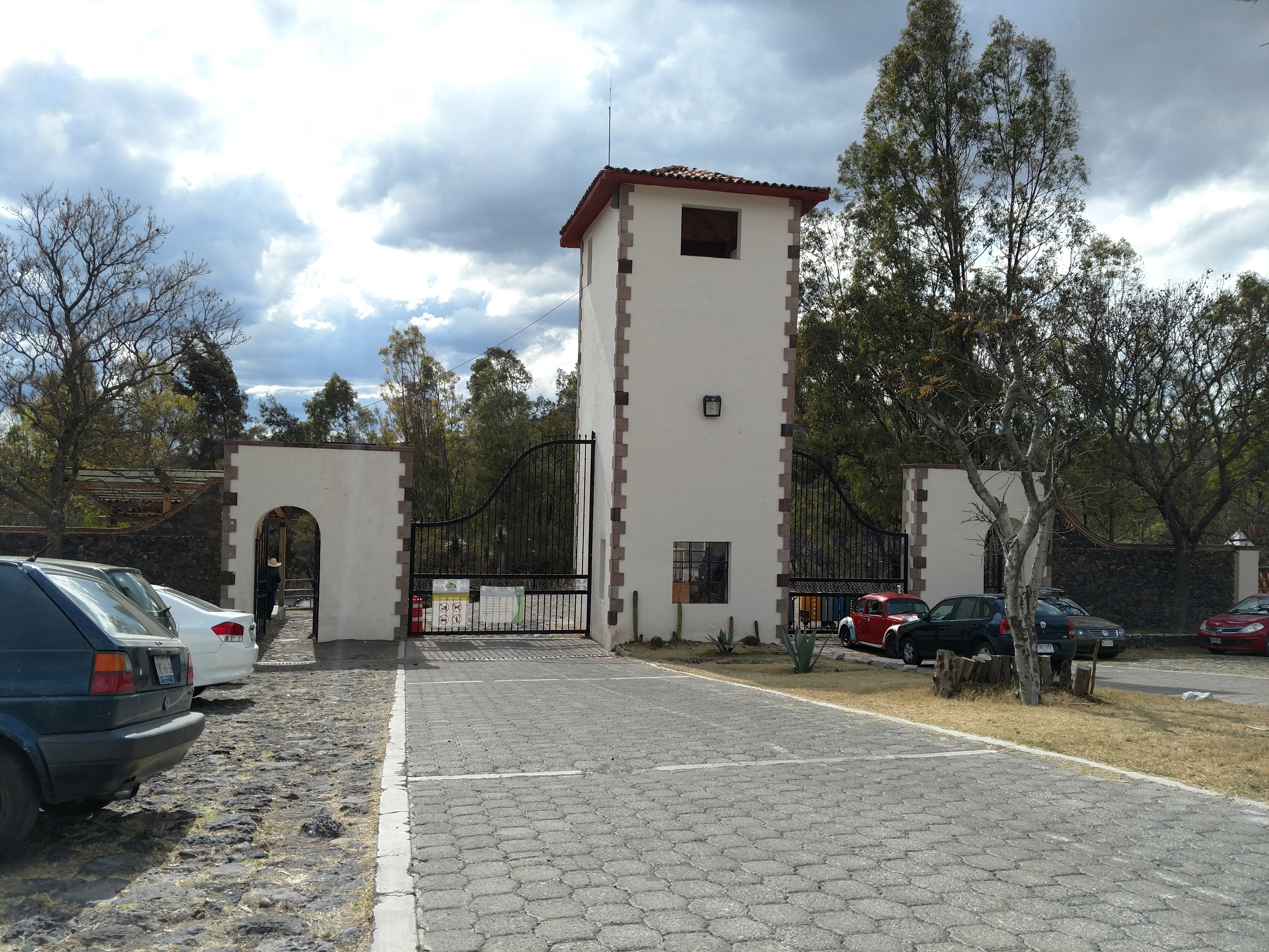 Entrada pública al Parque Nacional El Cimatario, en Querétaro.